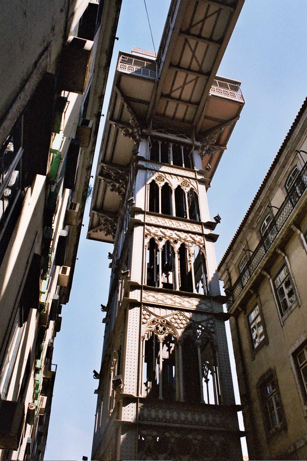 IngenieríaElevador